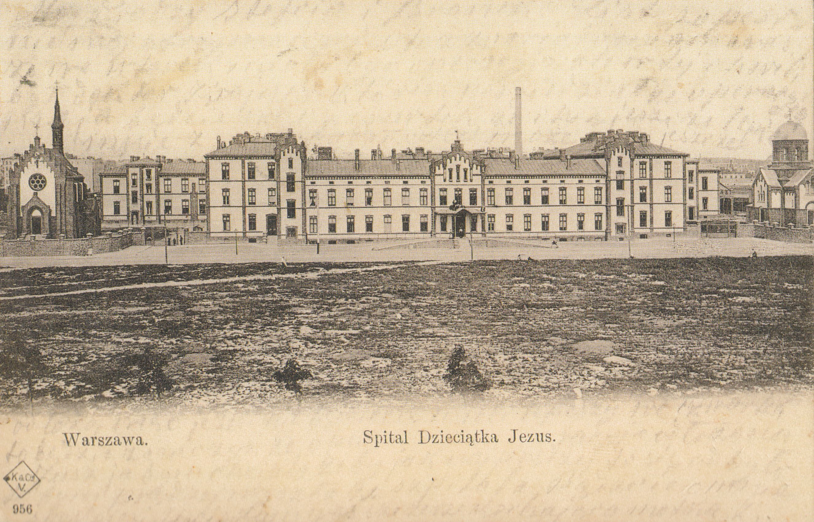 Szpital Dzieciątka Jezus w Warszawie